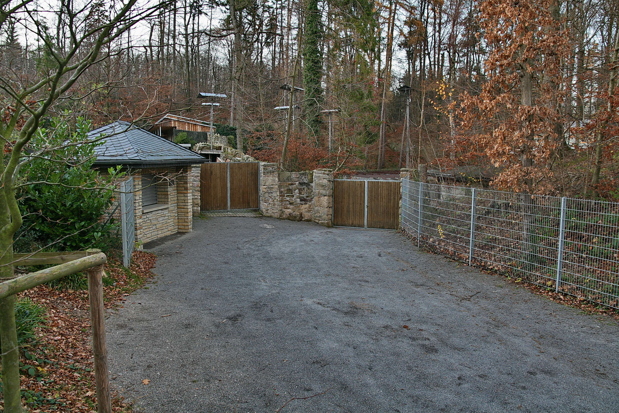 Vorplatz der Deister Freilichtbühne (Barsinghausen), Niedersachsen, Deutschland